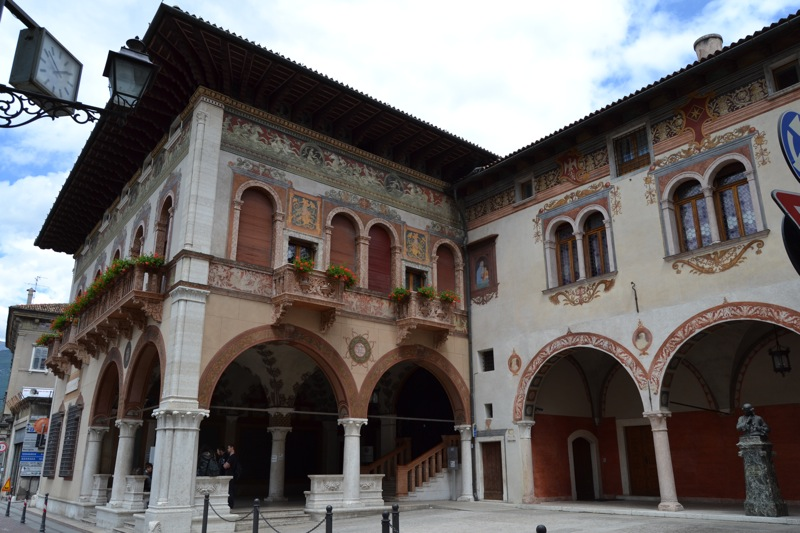 Rovereto, palazzo Del Ben in piazza Rosmini